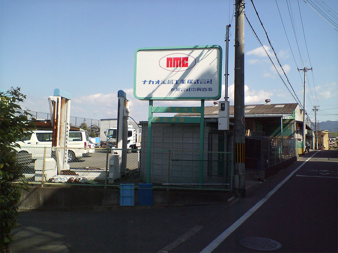 投稿者自身が『ナカオ金属工業株式会社 本社工場』（大阪府和泉市鍛治屋町5番地）を撮影。